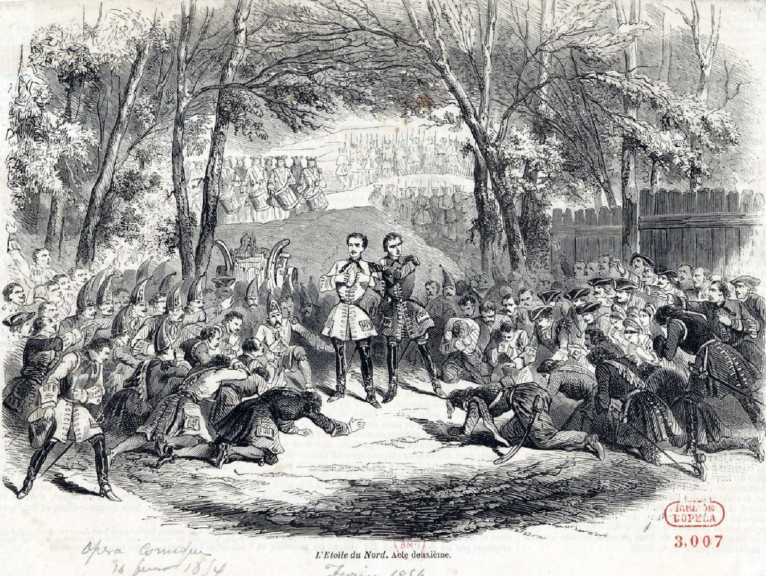 Acte II de L'Etoile du Nord de Meyerbeer (estampe)